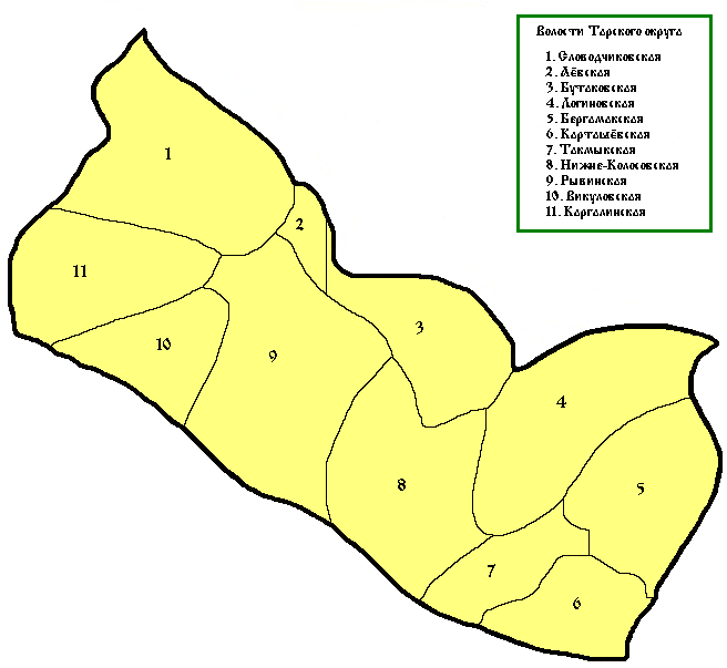 Тарский округ в 1850-е годы